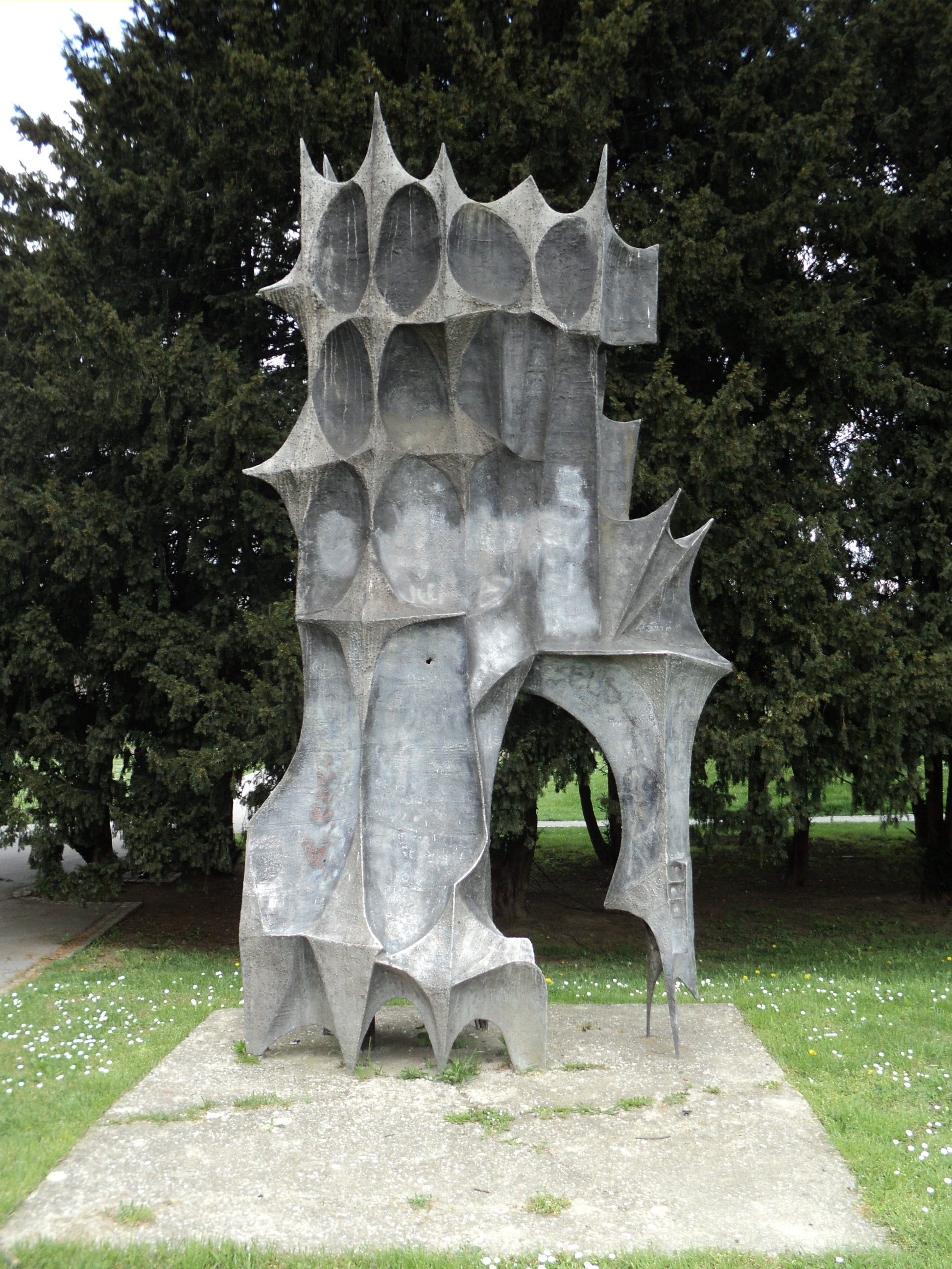 Spomenik Prosinačkim žrtvama, antifašistima obešenim od ustaša 20.12. 1943. u zagrebačkoj Dubravi; autor Dušan Džamonja